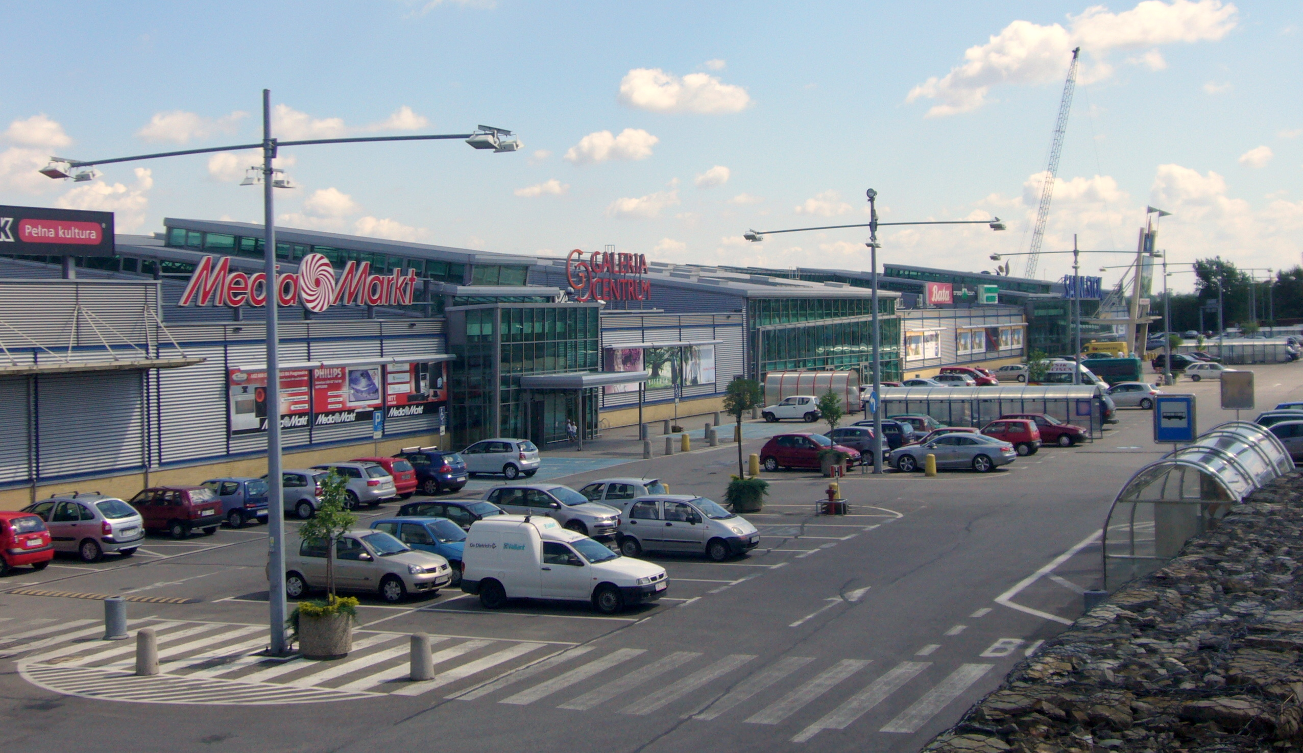 Centrum handlowe Sarni Stok w Bielsku-Białej.